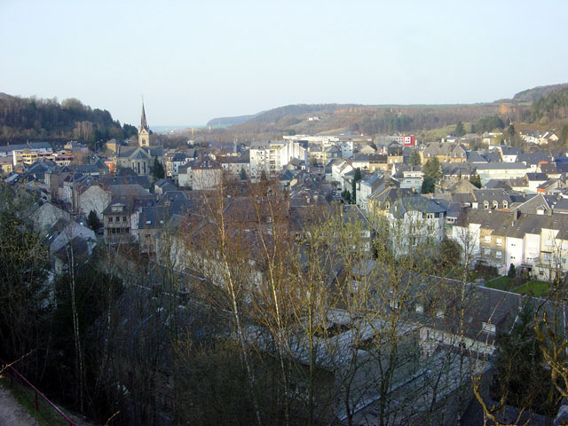 Stad Rëmeleng, vum éischten Hierzespronk aus gesinn.